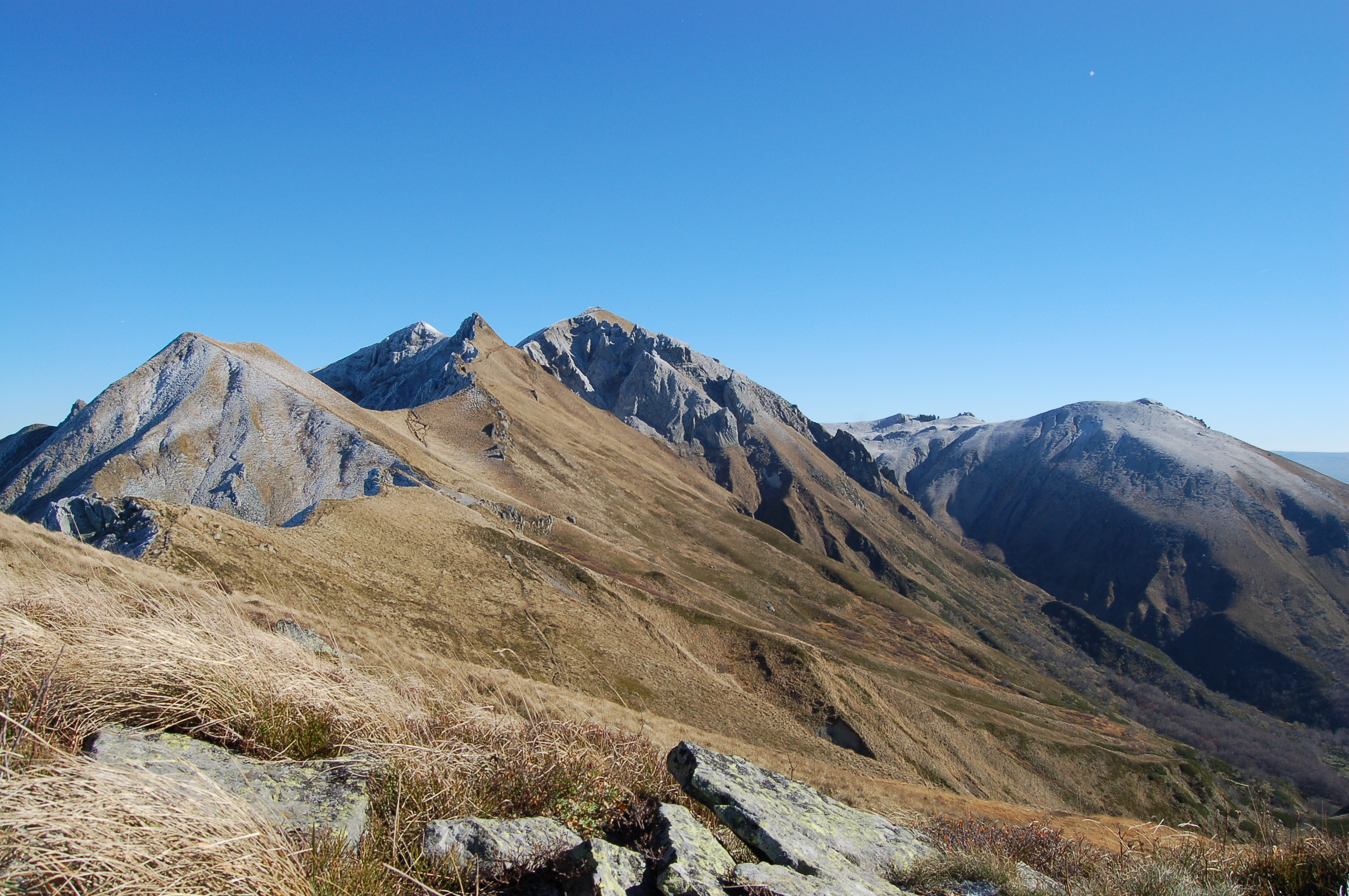 Vue du puy de Sancy depuis la Tour Carrée